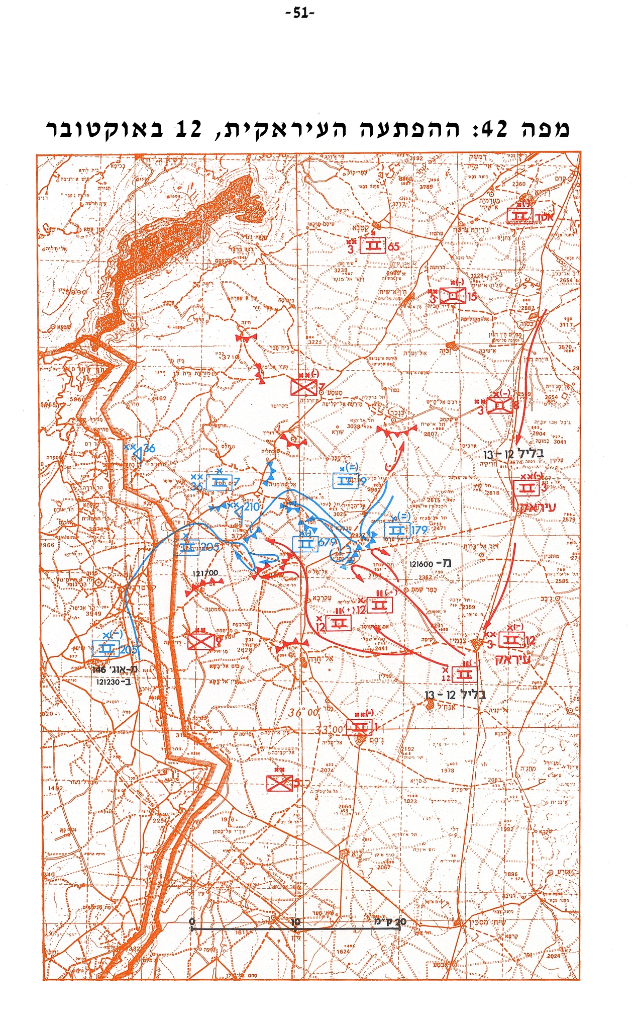 מפה 42 - ההפתעה העירקאית, 12 לאוקטובר - מלחמת יום הכיפורים